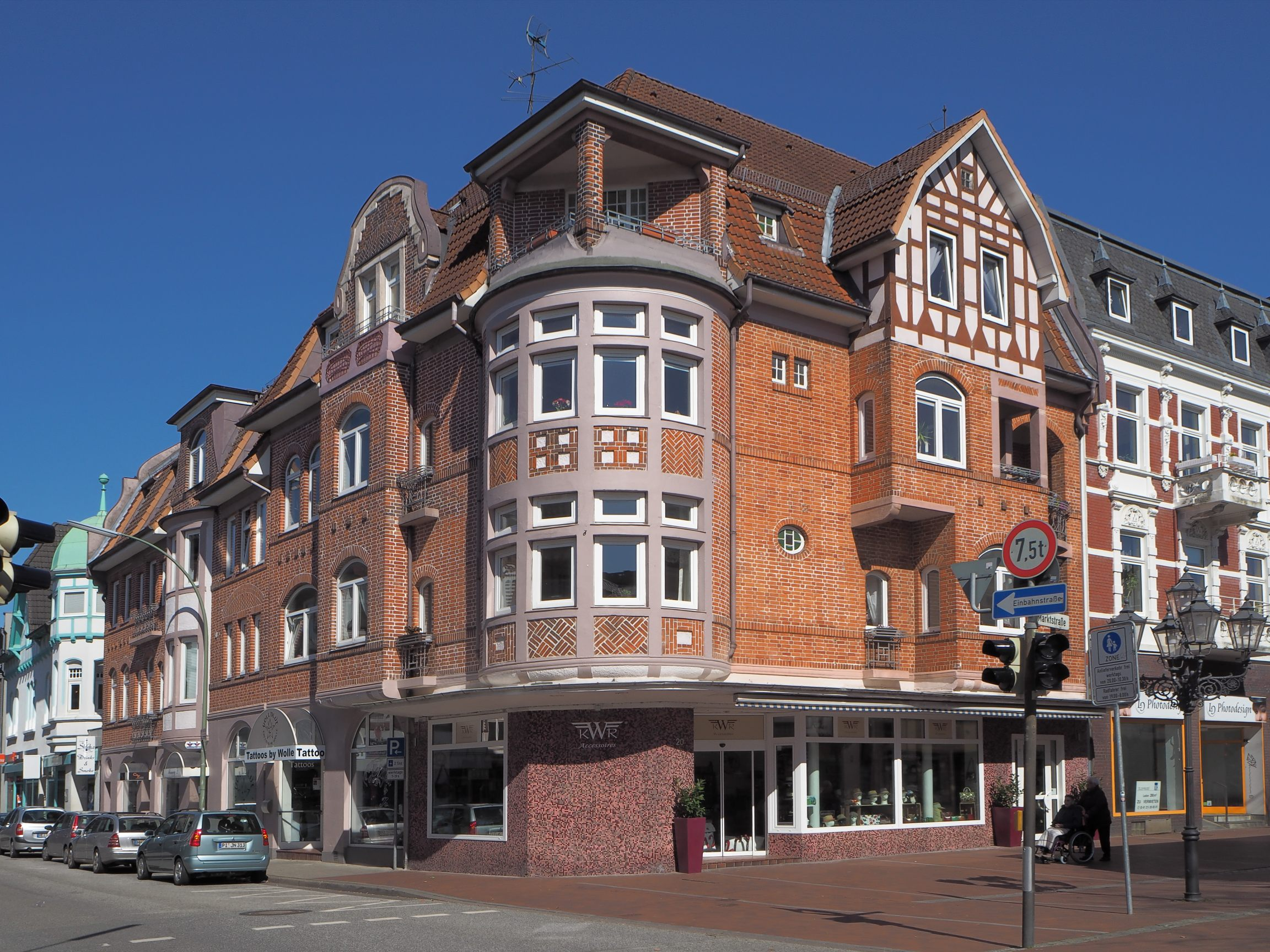 Hamburg, Elmshorn, Marktstr. 20, Wohn- und Geschäftshaus, Baujahr: 1912, Foto: April 2015. Das Objekt war vor 2015 Kulturdenkmal.